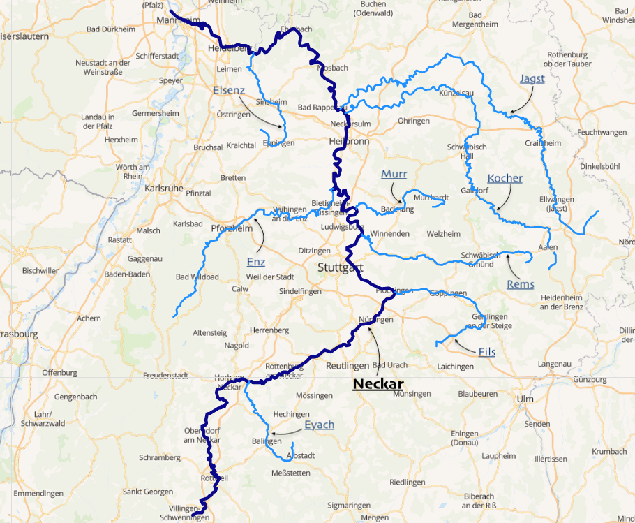 carte réalisée sur umap This map may be incomplete, and may contain errors. Don't rely solely on it for navigation.